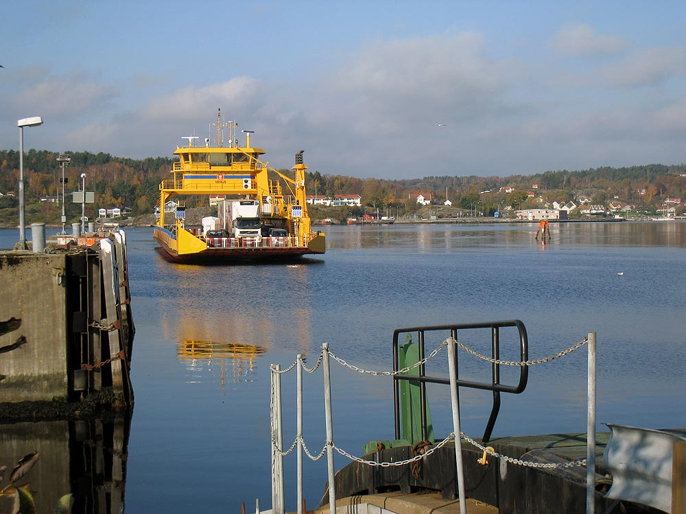 Trafikverkets bilfärja "Venus" Svanseund - Kolhättan